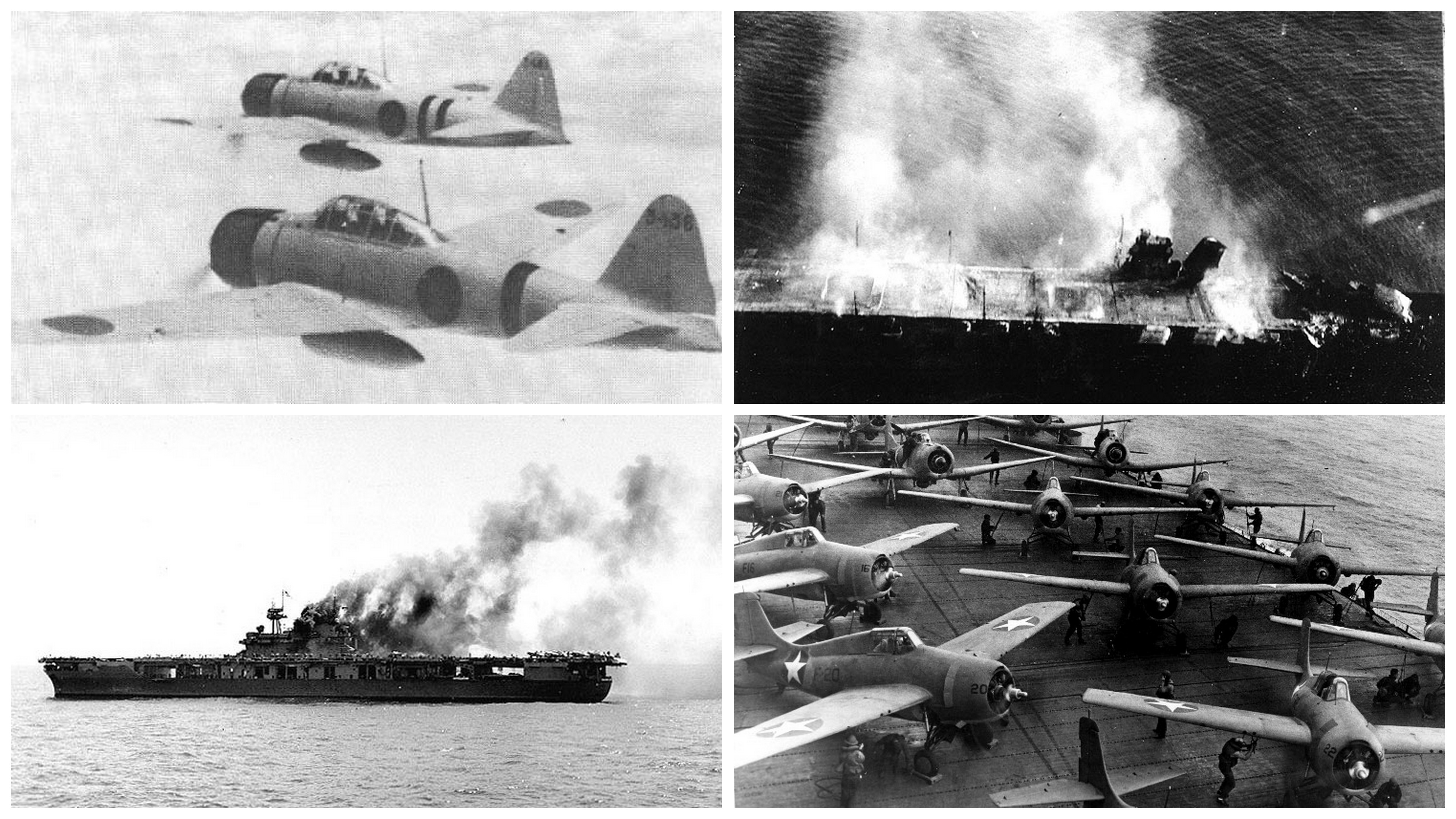 Collage di varie foto sulla battaglia di Midway.